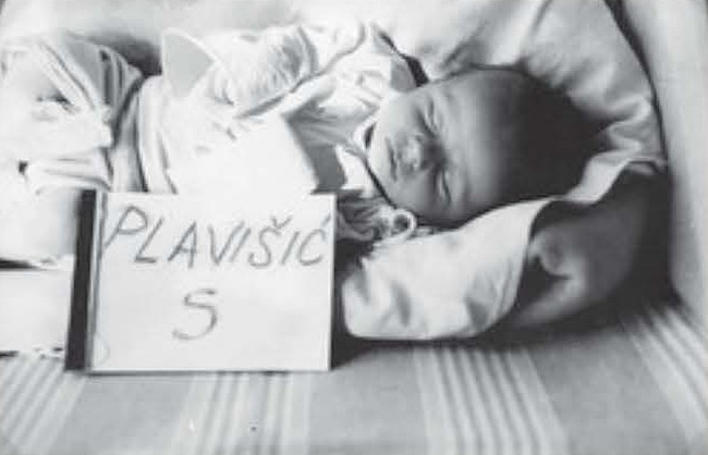 Srpskohrvatski / српскохрватски: Muzejski opis: »Fotosi 5 albuma originalnih fotografija djece iz 1942., koja su iz pojedinih ustaških logora dovedena u Zagreb. Albumi sadrže 537 fotografija.«